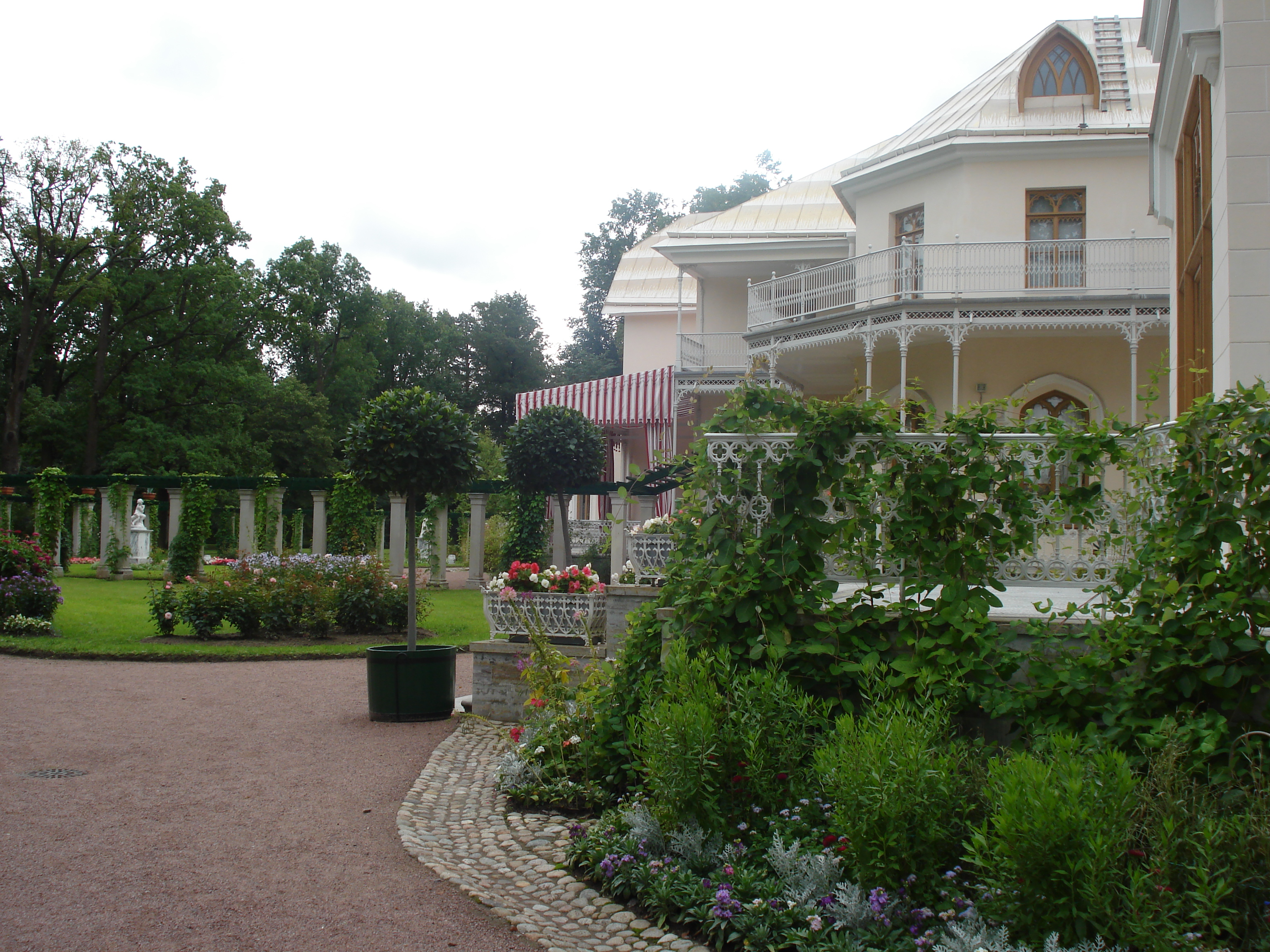 парк Александрия, дворец Фермерский